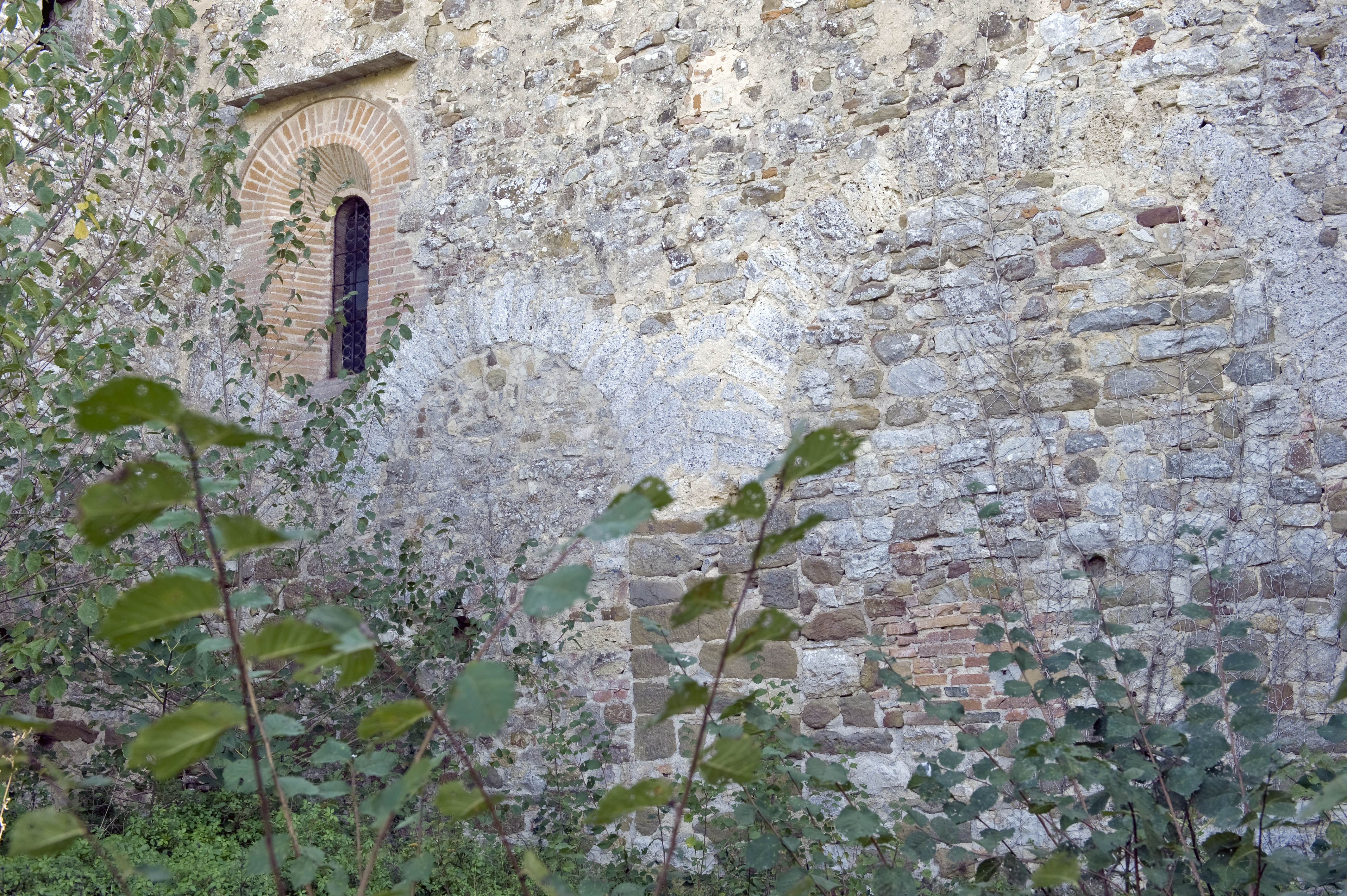 Resti della archeggiature della navata destra nella pieve di san Giovanni Battista a Pievasciata